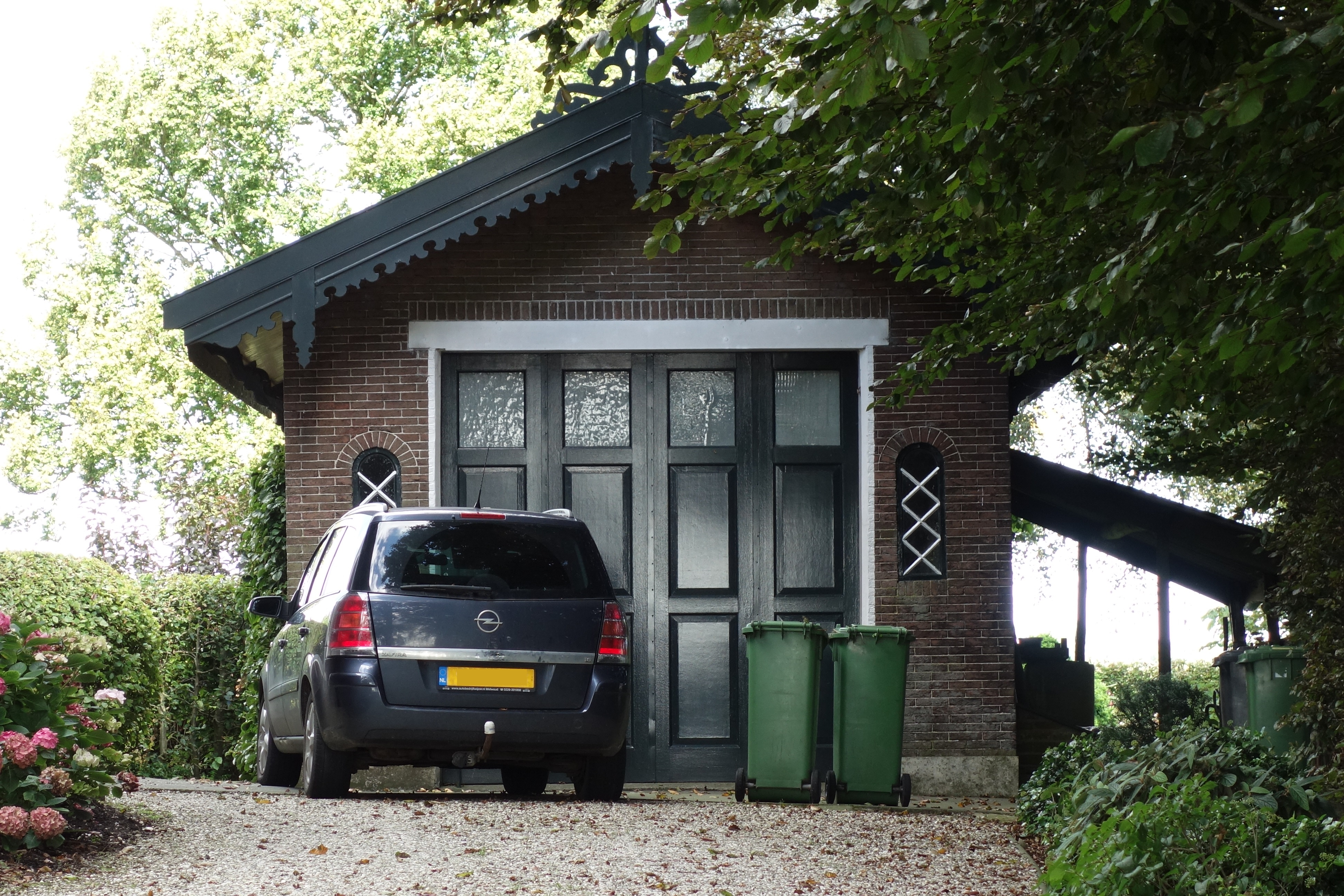 Mariënhof: koetshuis